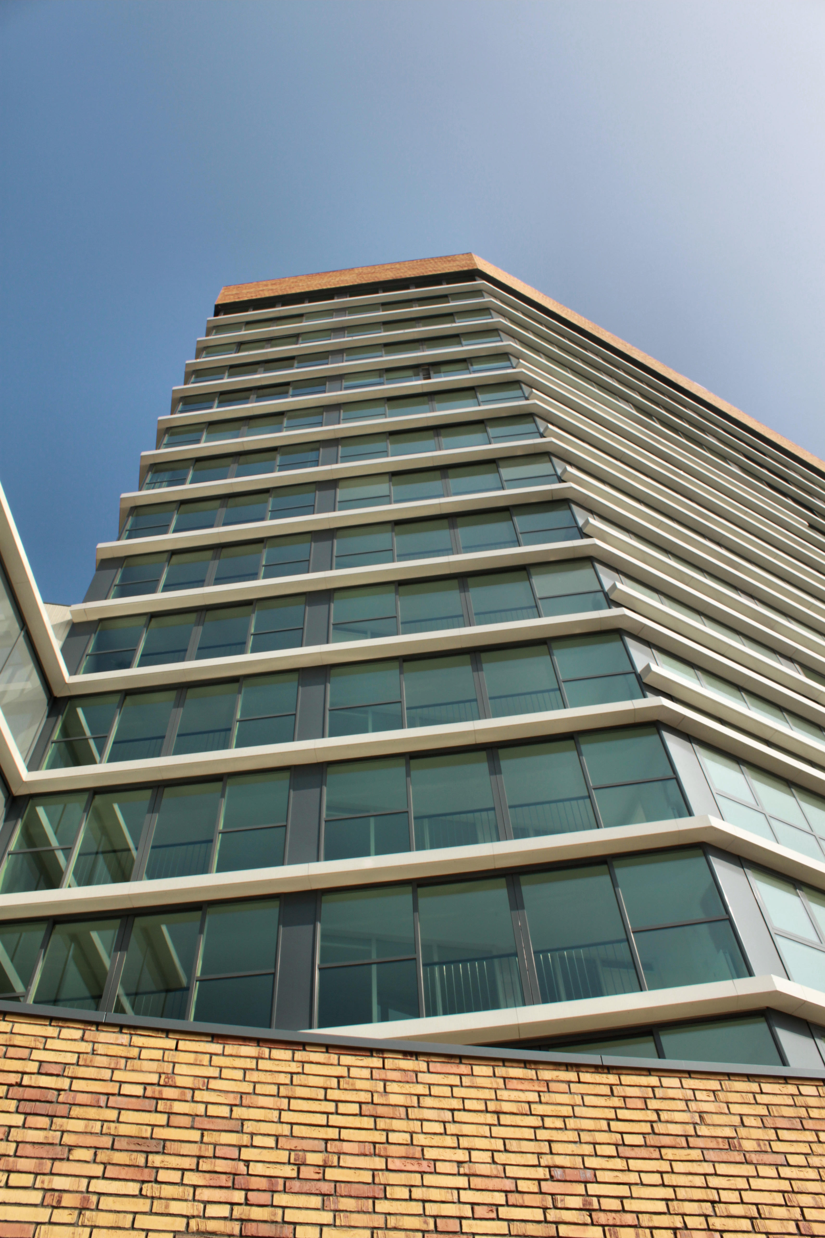 Nieuwbouwproject "De Hoven" in Capelle aan den IJssel